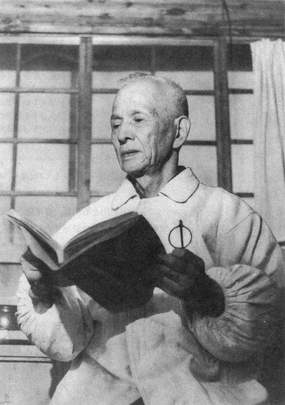 Foto Itaya Hazan